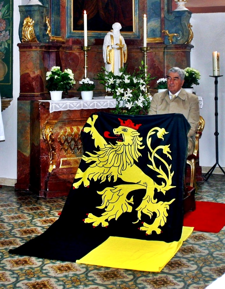 Fürst Alois Konstantin zu Löwenstein, 2013, in der Wallfahrtskirche Zell, Zellertal, mit der Pfalzfahne